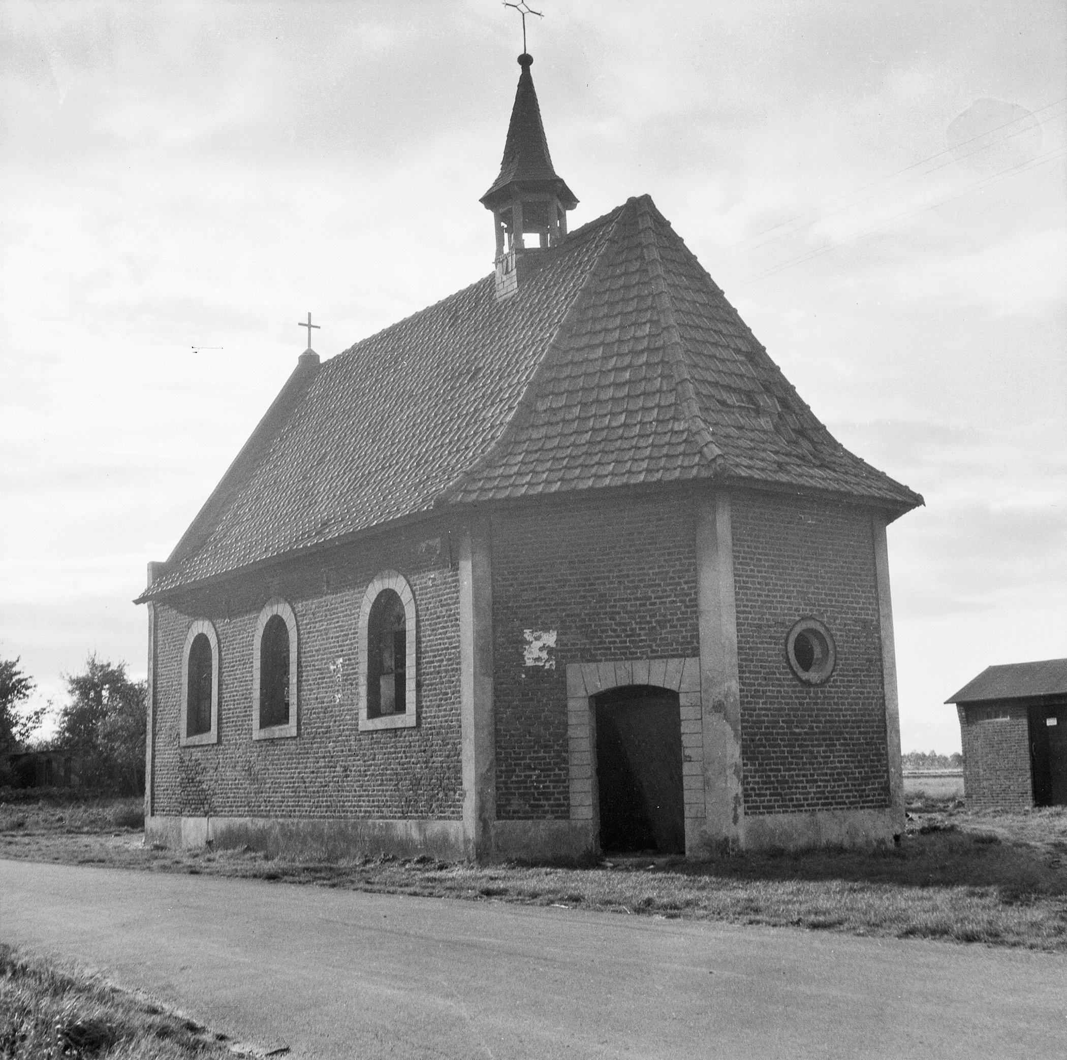 Kapel H.Sebastiaan: exterieur naar het noord-westen